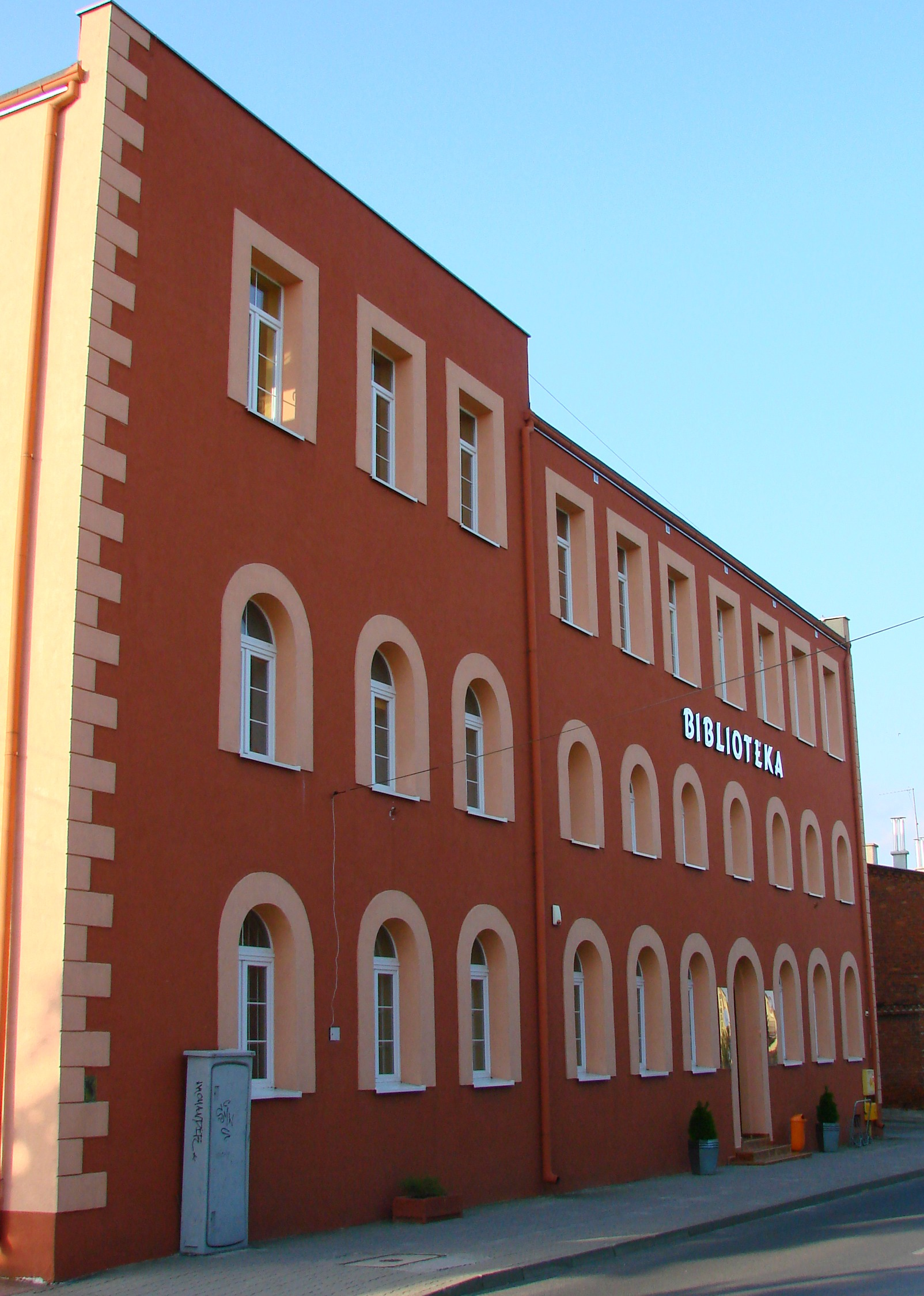 Biblioteka Publiczna im. J. Iwaszkiewicza, przy ul. Wojska Polskiego. Obiect in Sępólno Krajeńskie, Poland.